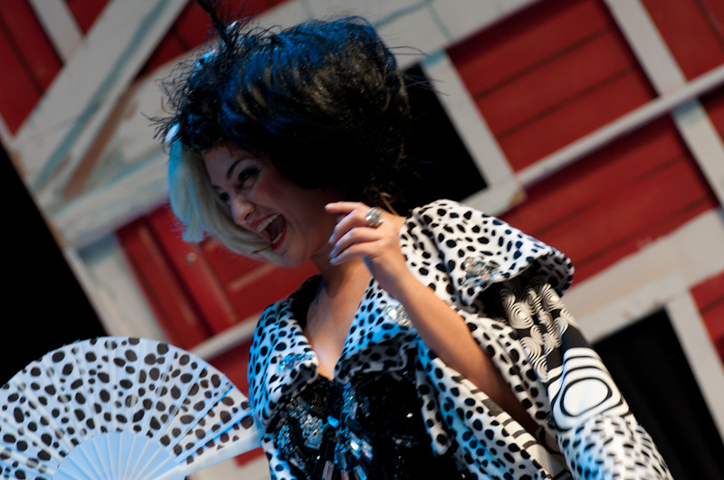 עדי ארד